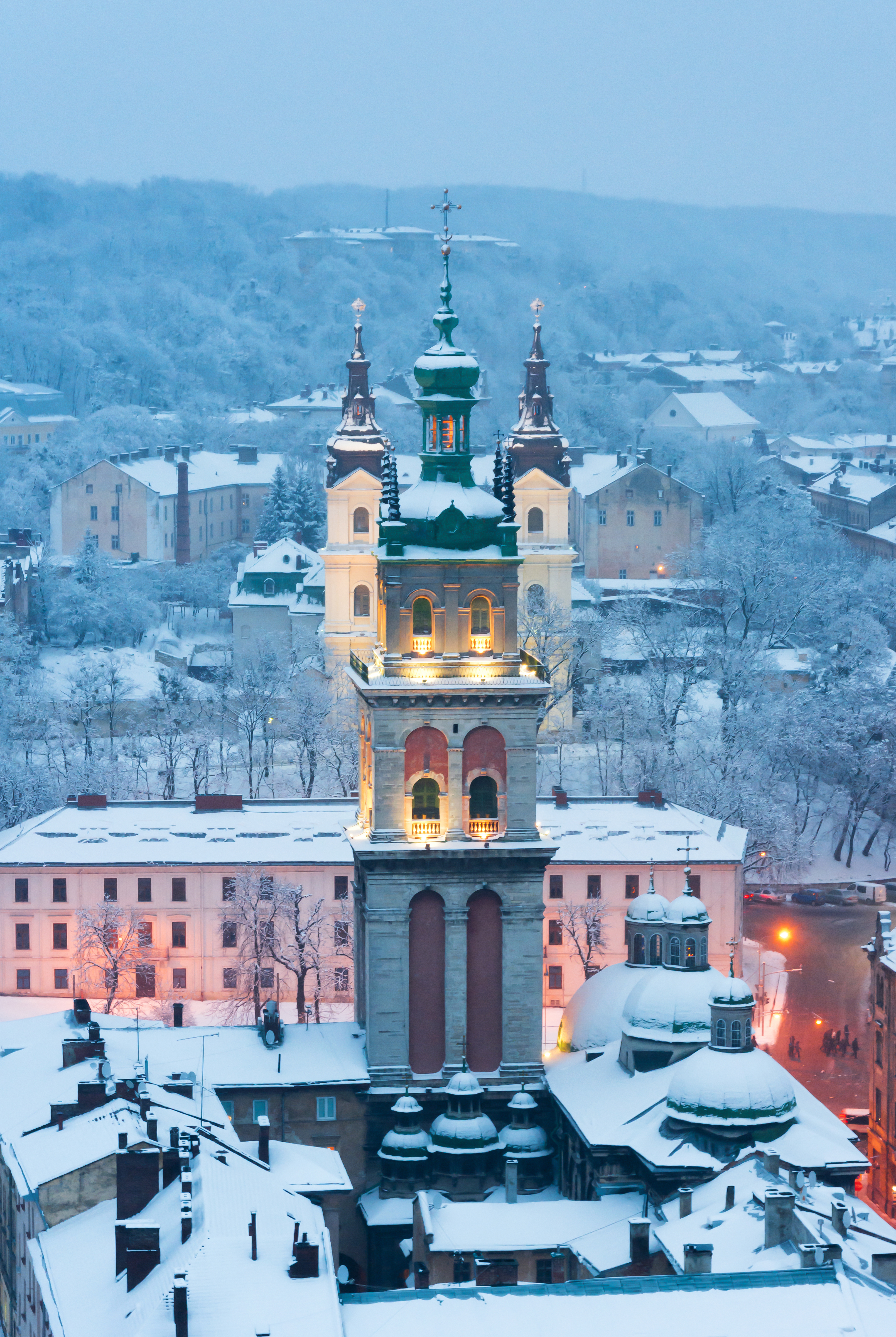 Дзвіниця (вежа Корнякта), Львів, Руська вул.